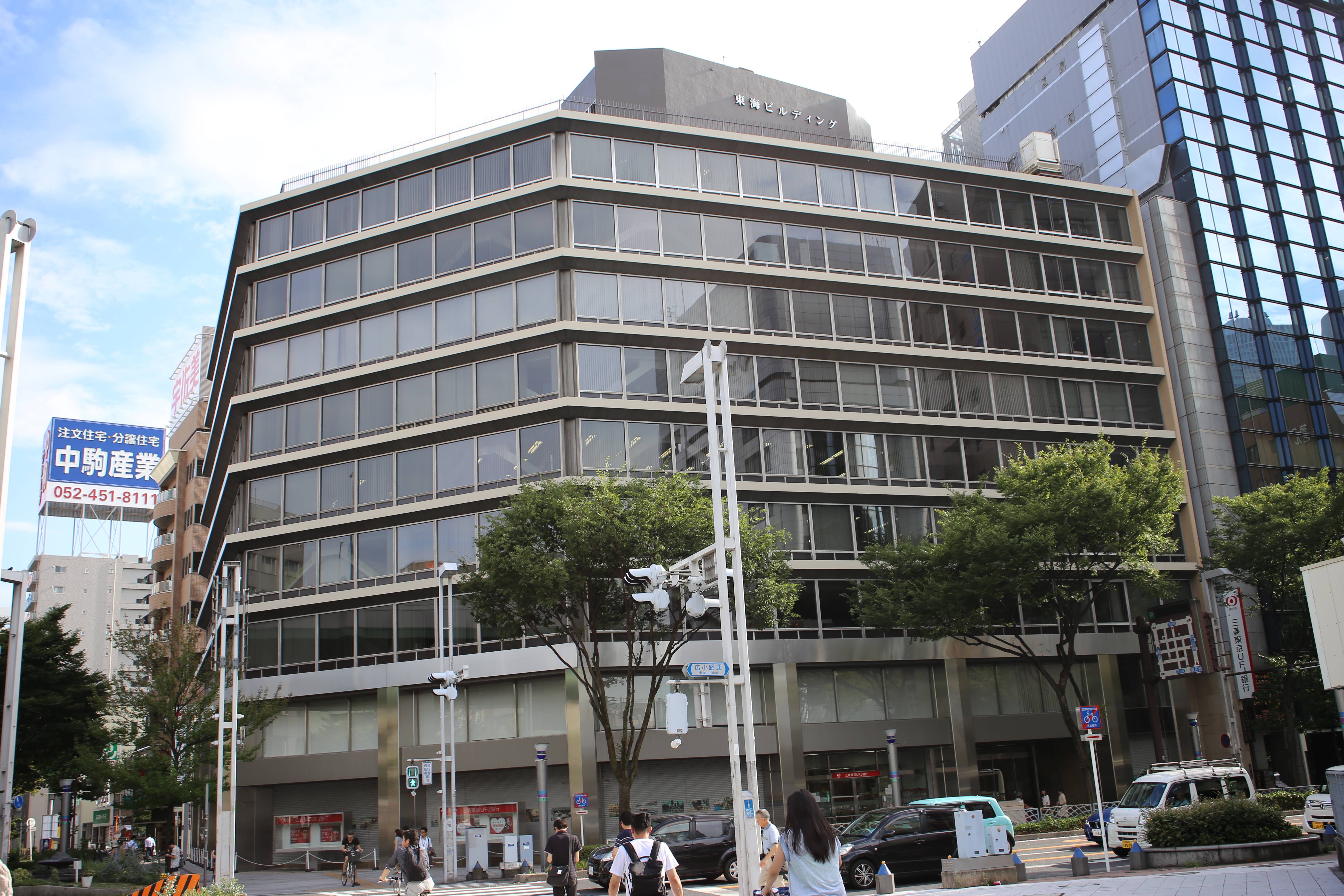 名古屋市中村区名駅南一丁目の東海ビルを北側公道より撮影